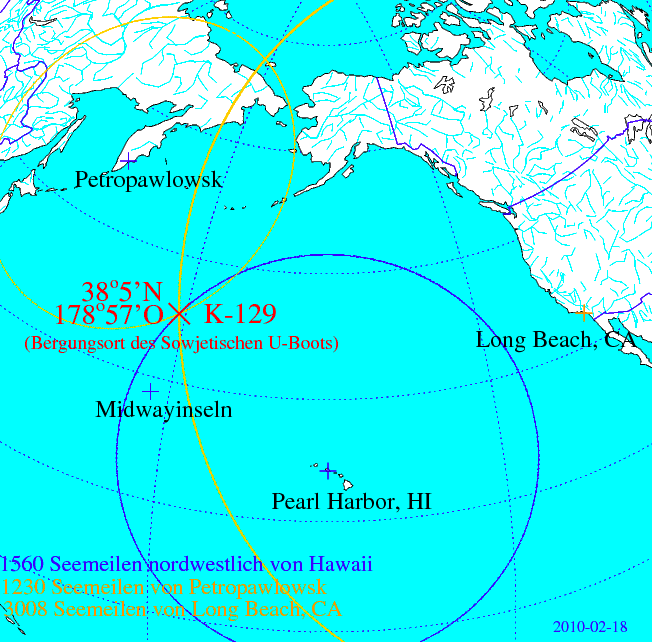 Bergungsort des sowjetischen Raketen-U-Boots K-129 durch die USNS Hughes Global Explorer